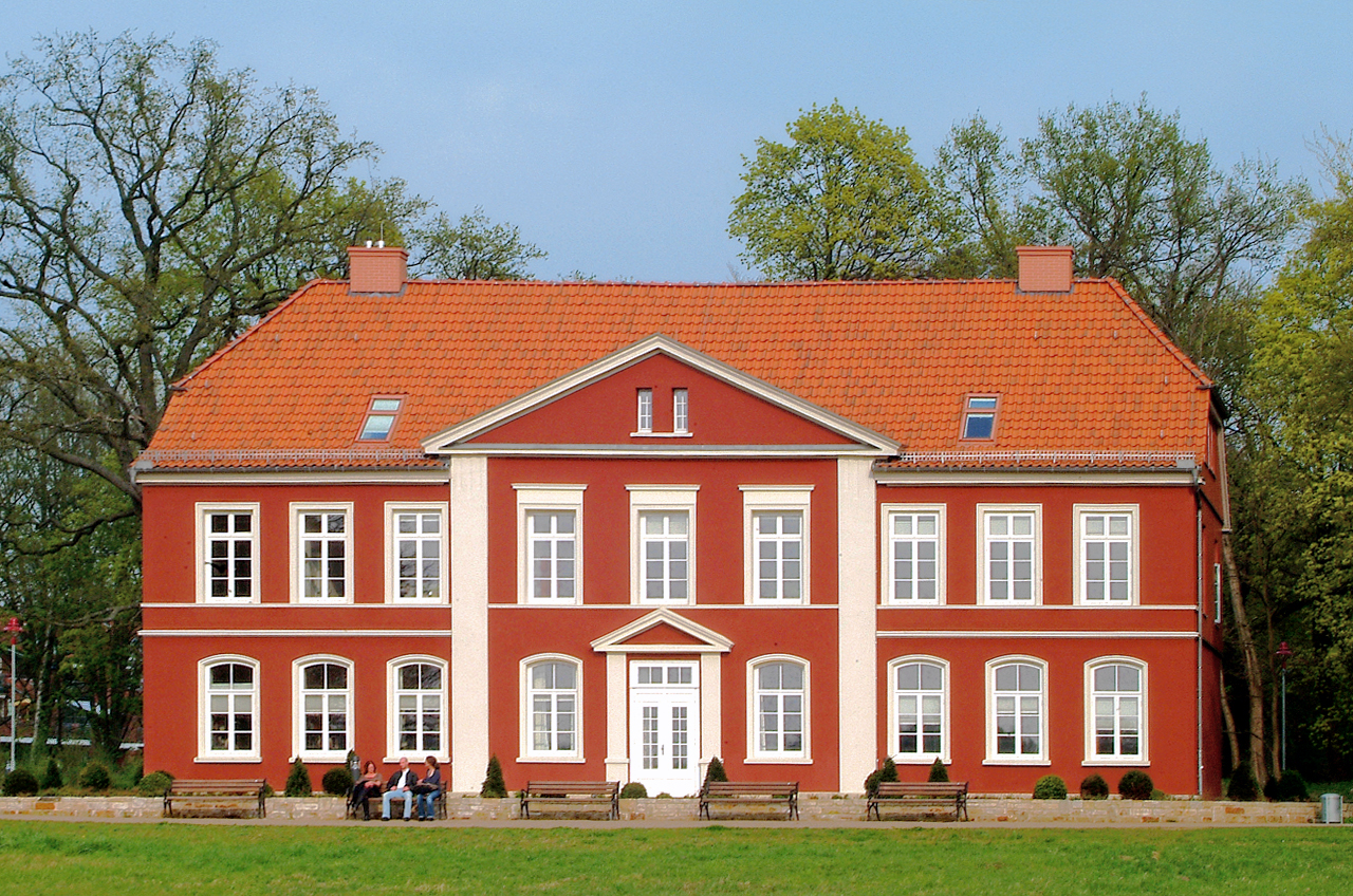 Die Thaersche Villa, gesehen von den Dammaschwiesen in Celle